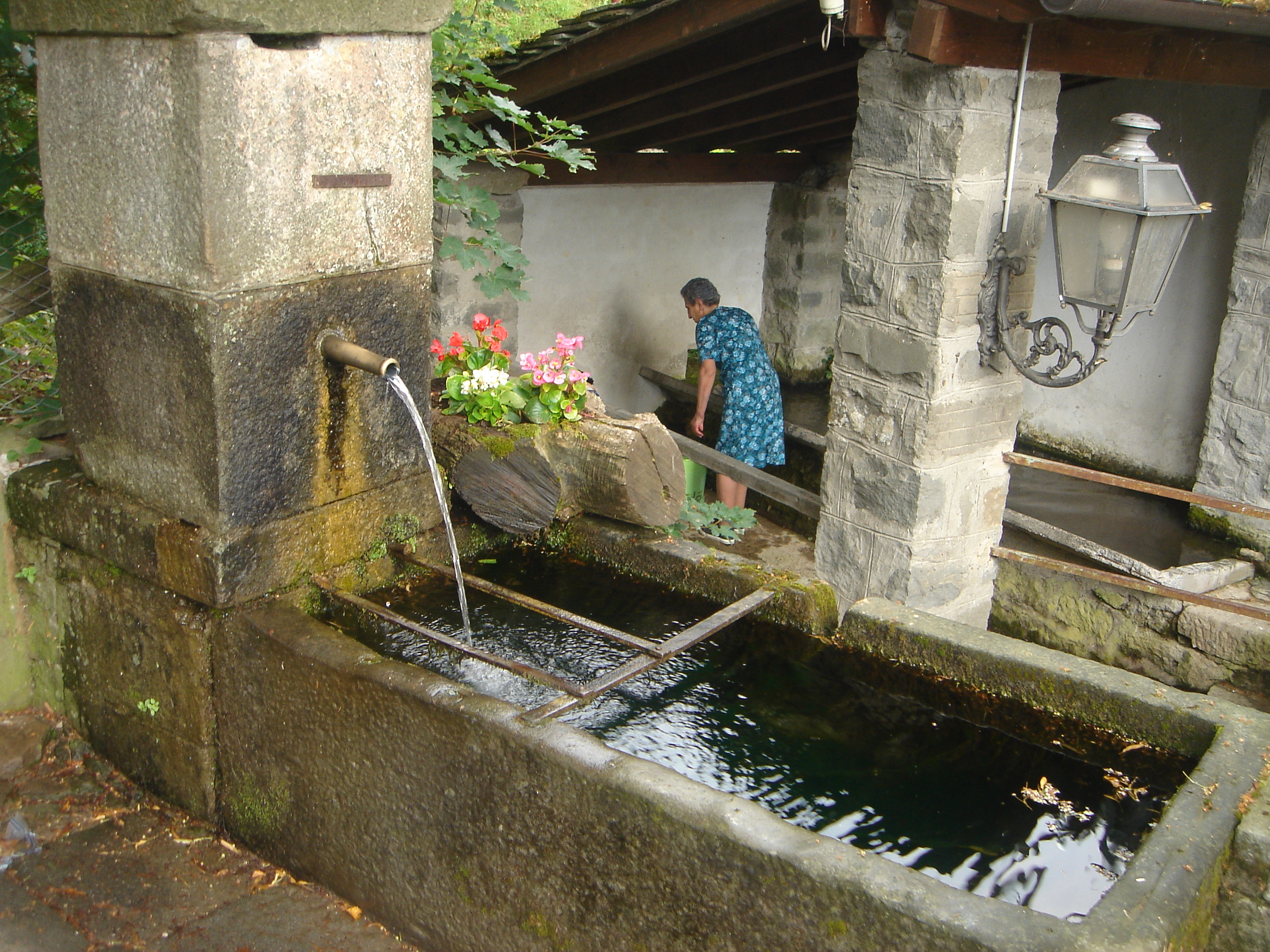 la fontana della frazione de "I Casoni"